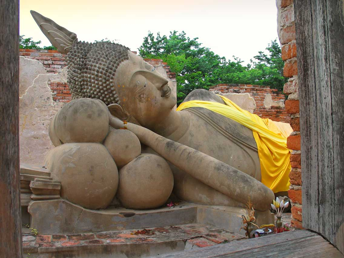 Reclining Buddha at Wat Phutthai Sawan, Ayutthaya, Thailand.